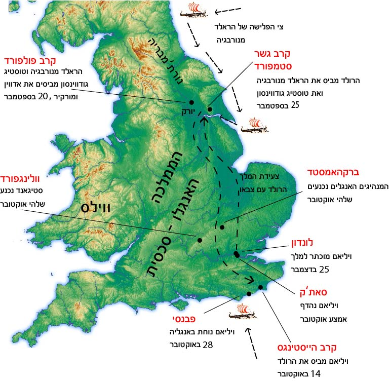 הכיבוש הנורמני של אנגליה, 1066